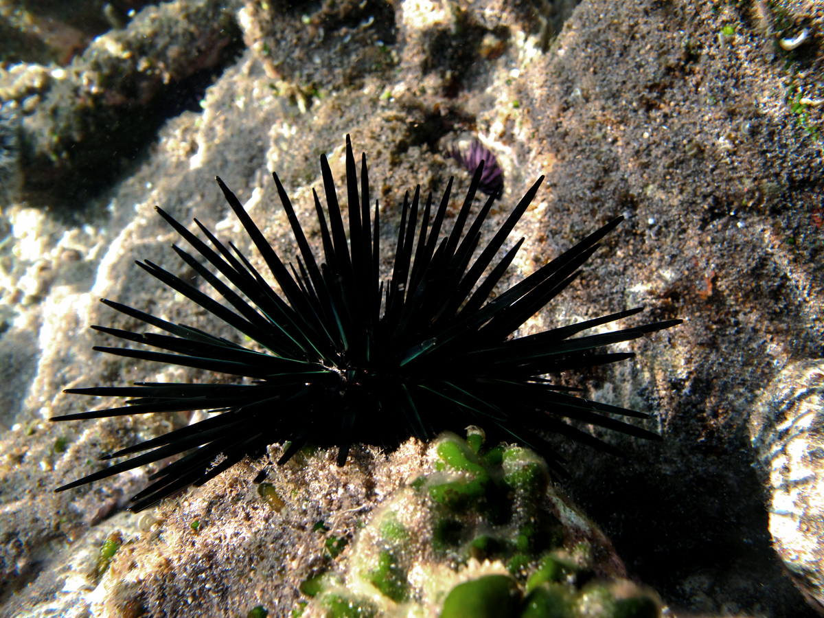 Oursin noir Stomopneustes variolaris à la Réunion (plage Jacques Tessier).